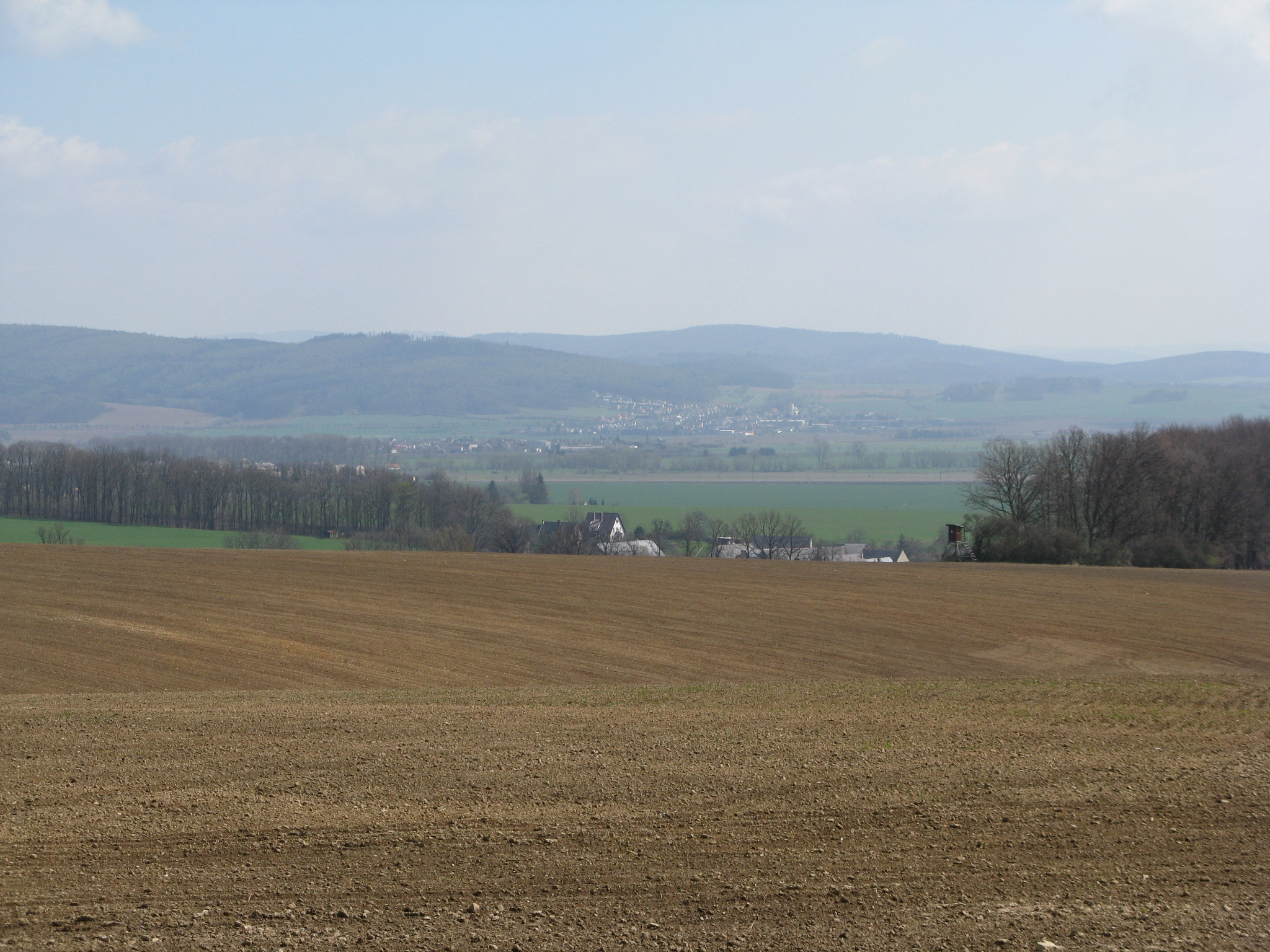 Česky: MB-pohled V směrem (nad Květínem) - v pozadí Úsovská vrchovina